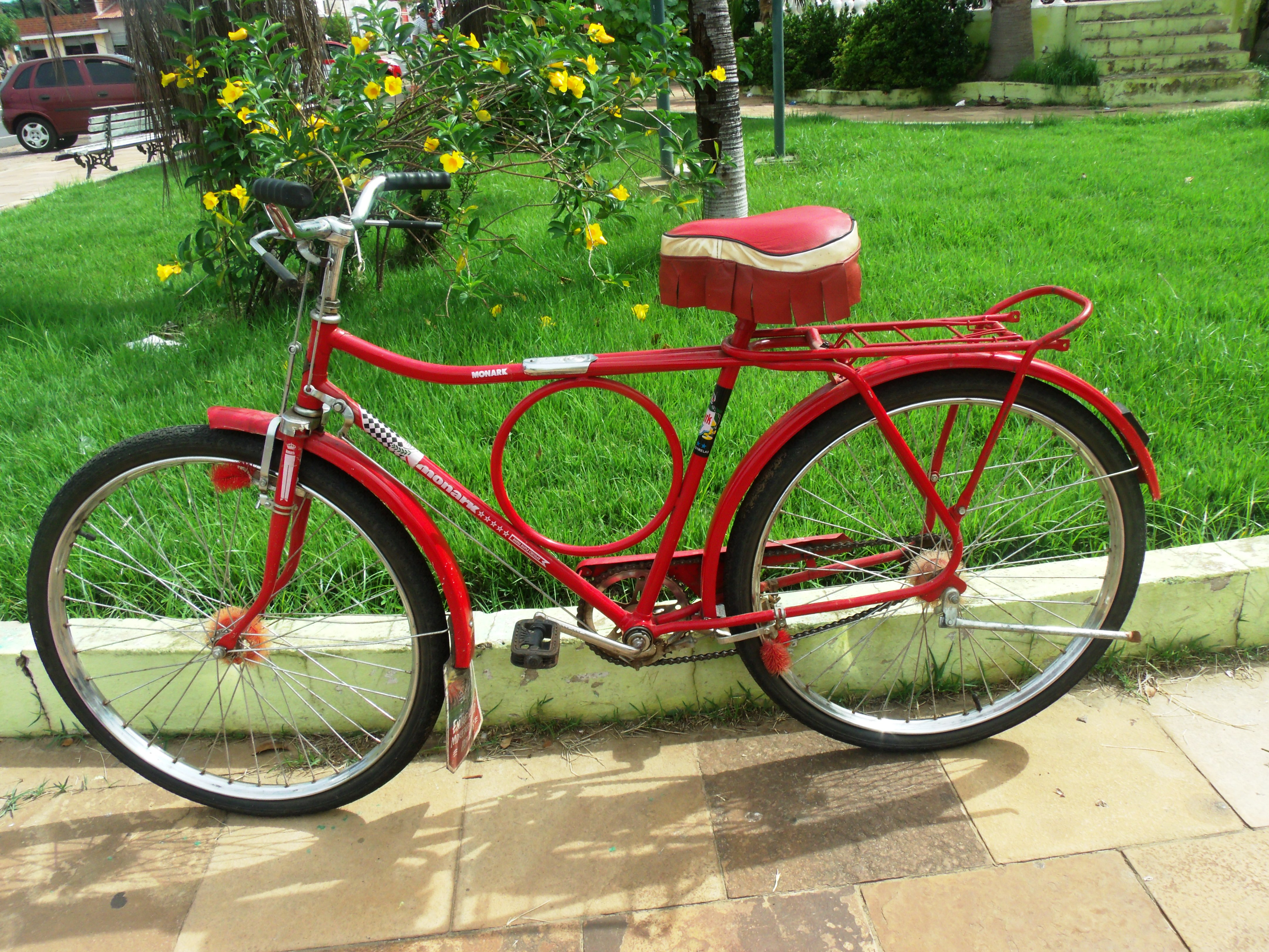 Uma monark barra circular 1977, na praça JK em Capitão de Campos-PI.